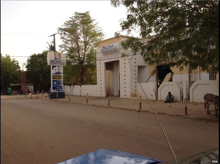 BDM détruite (les banques ont été dévalisées et/ou détruites après la chute du Nord-Mali)